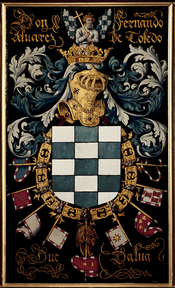 schilder uit Valenciennes; vermoedelijk Jacques Le Boucq, Blazoen van het 23ste Gulden-Vlieskapittel, 1559, Fernando Alvarez de Toledo; inv: 433 N.194